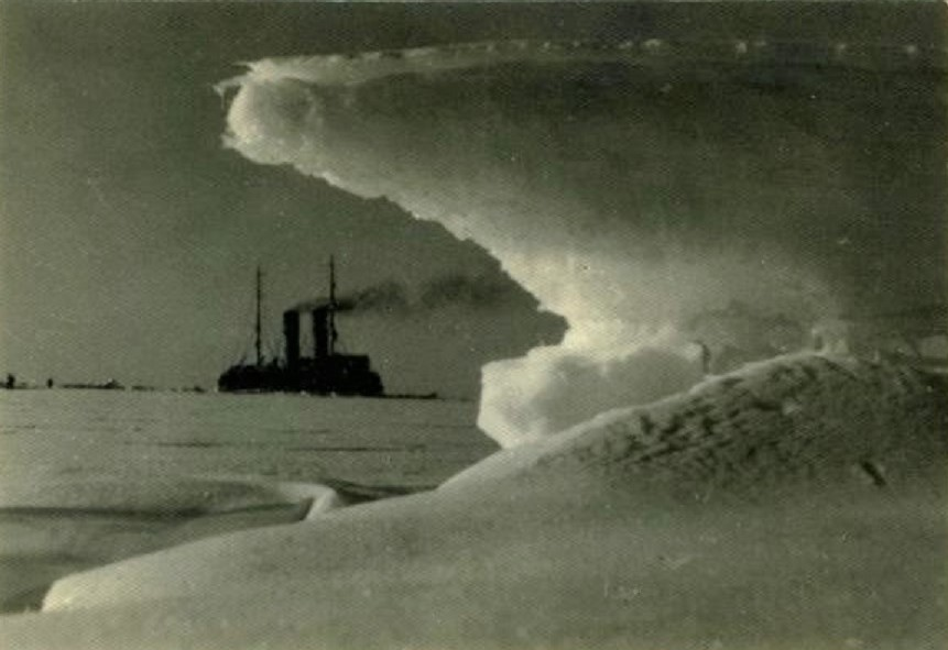 Ледокол «Красин» идет по Северному морскому пути